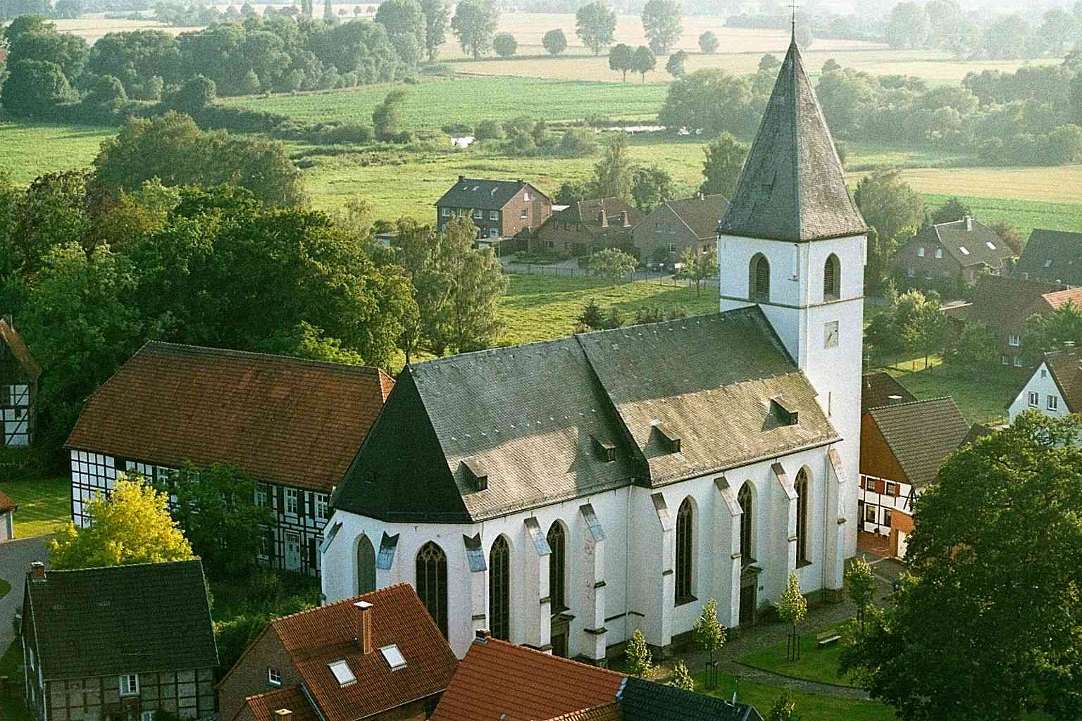 Ev. Pfarrkirche St. Othmar Dinker This is a photograph of an architectural monument.